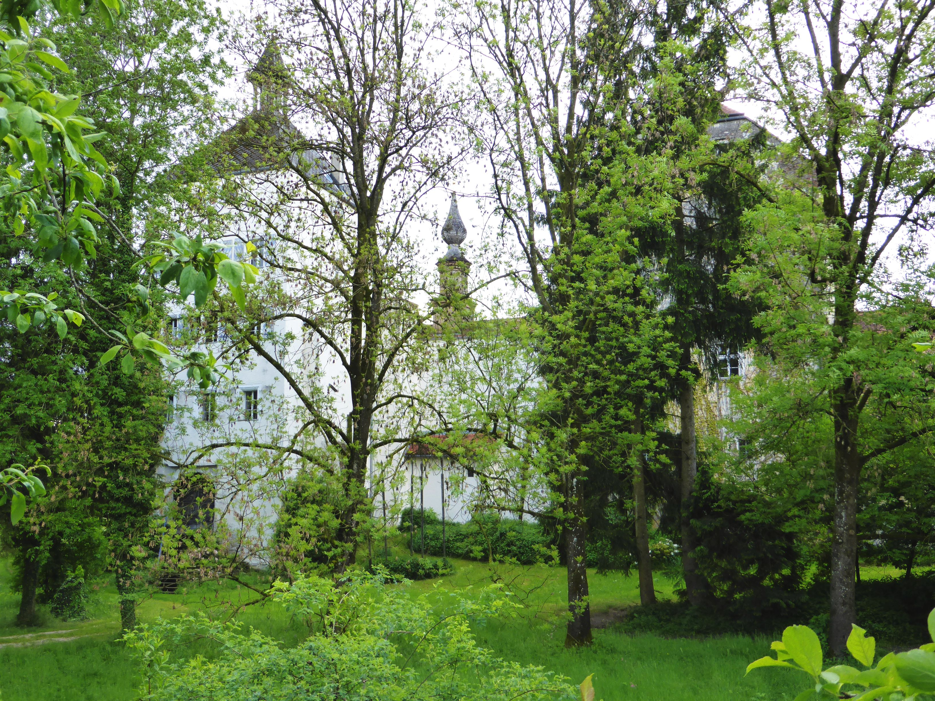 Schloss Triebenbach (Rückseite)